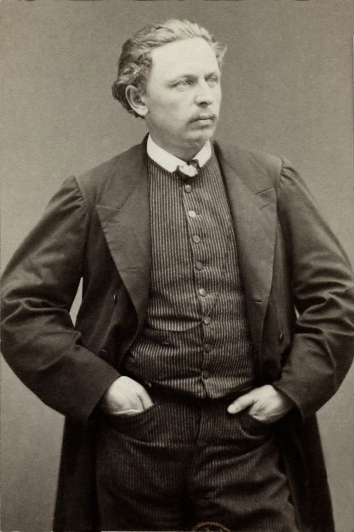 Émile Breton (1931 - 1902), peintre français, frère de Jules.